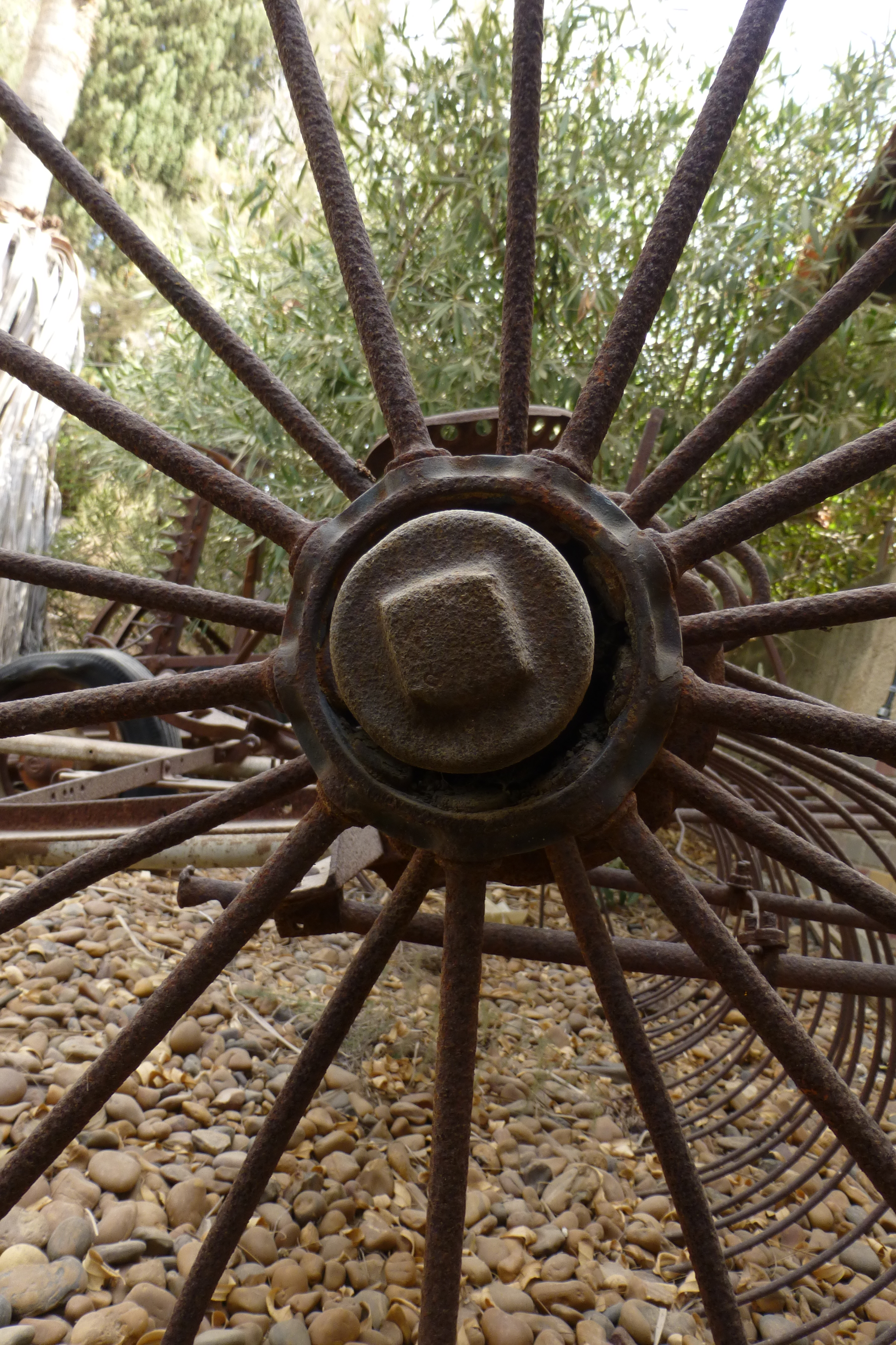 נבנה ב1924, על ידי משה ורחל מינץ. שימש בחלקו המערבי כבית מגורים ובחלקו המזרחי כבית עם. כיום הוא משכנו של מוזיאון לתולדות גדרה והביל"ויים.